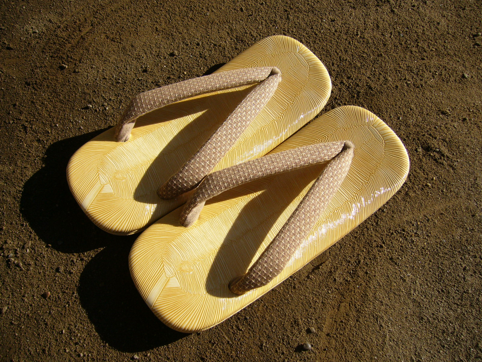 japanese-leather-soled-sandals,setta,katori-city,japan